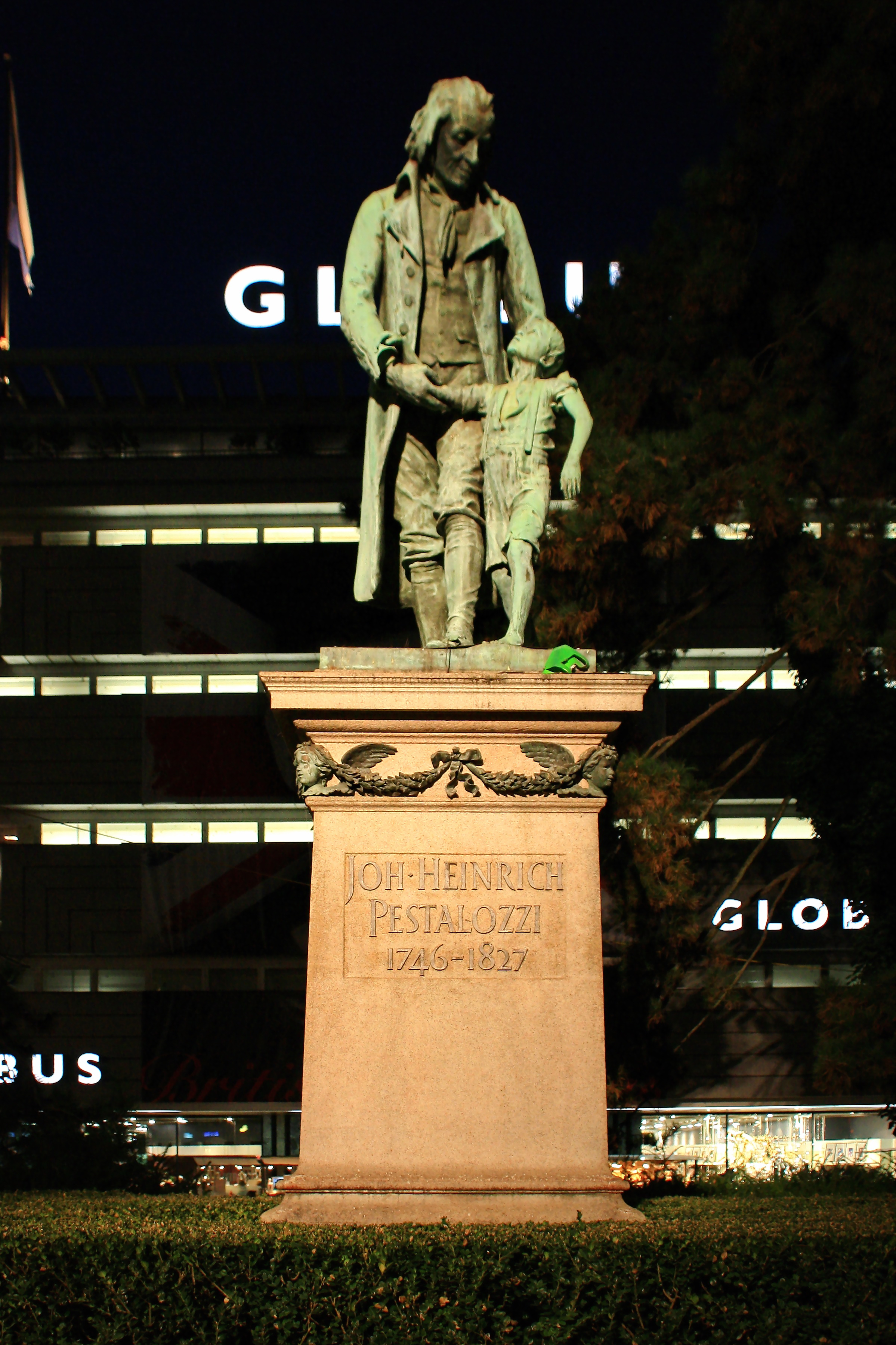 Johann Heinrich Pestalozzi (1746-1827) memorial at Pestalozziwiese (Bahnhofstrasse) in Zürich, Switzerland